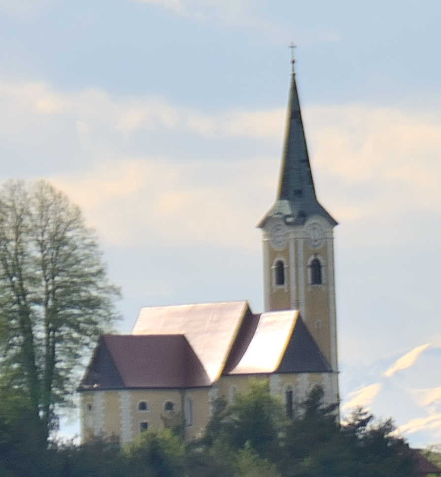 Cerkev Sv.Rozalije Šentjur